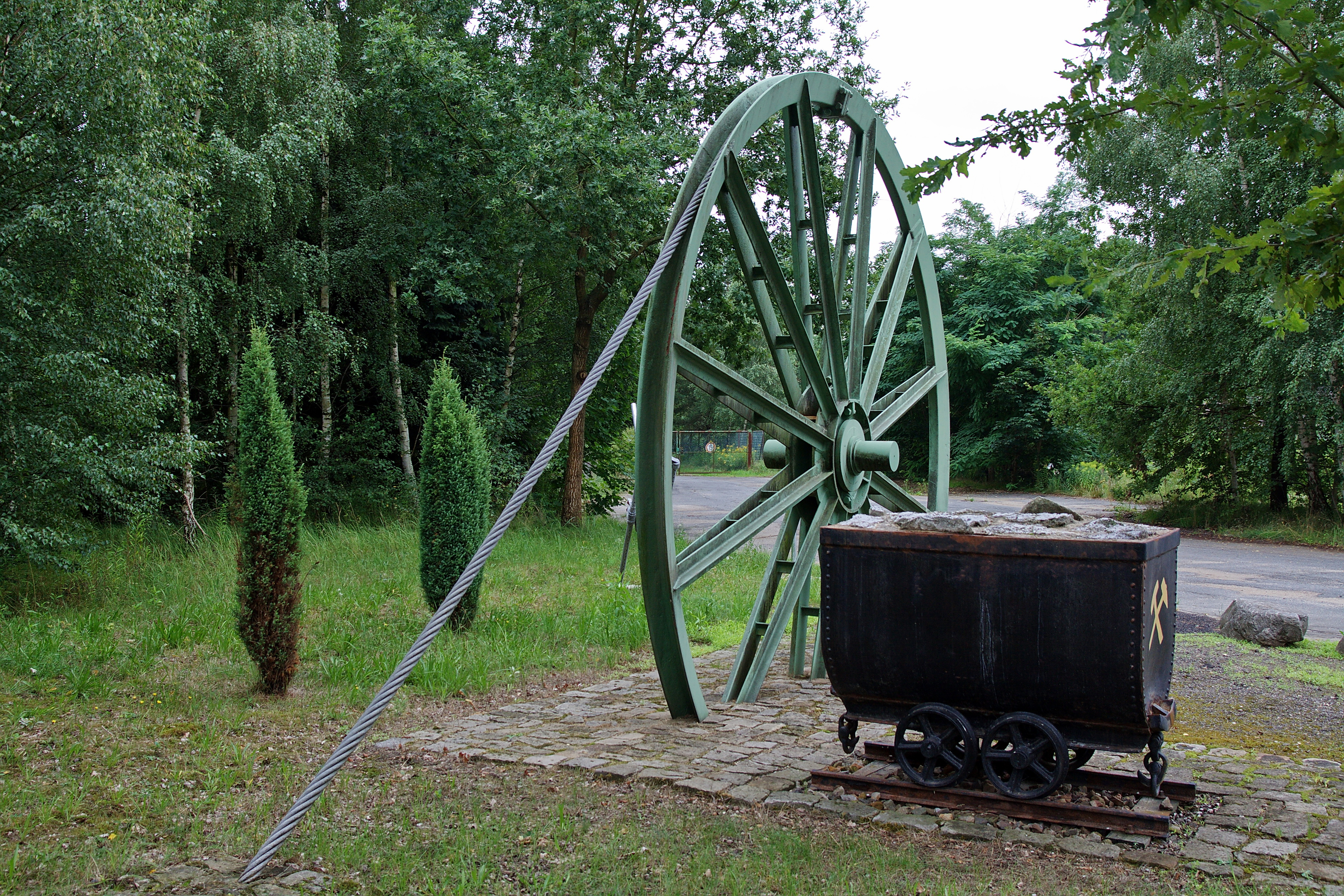 Ehemalige Stein- und Kalisalzgrube "Mariaglück" in Höfer (Eschede), Niedersachsen